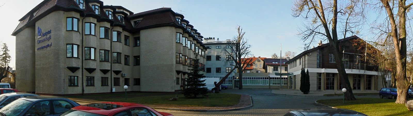 Sopot Dolny, ul. Powstańców Warszawy 55 - Instytut Oceanologii PAN